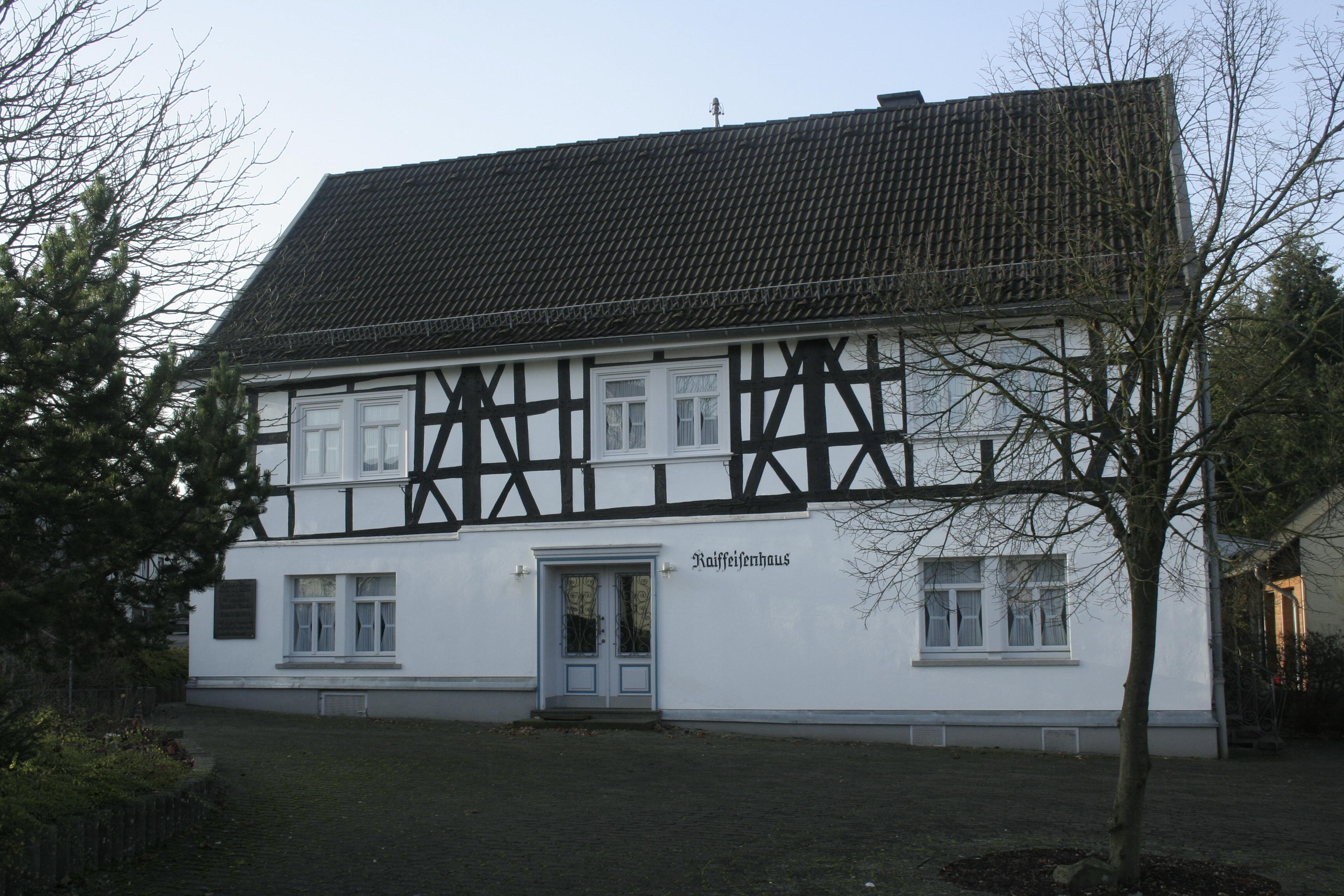 Raiffeisenhaus und Begegnungsstätte in Weyerbusch